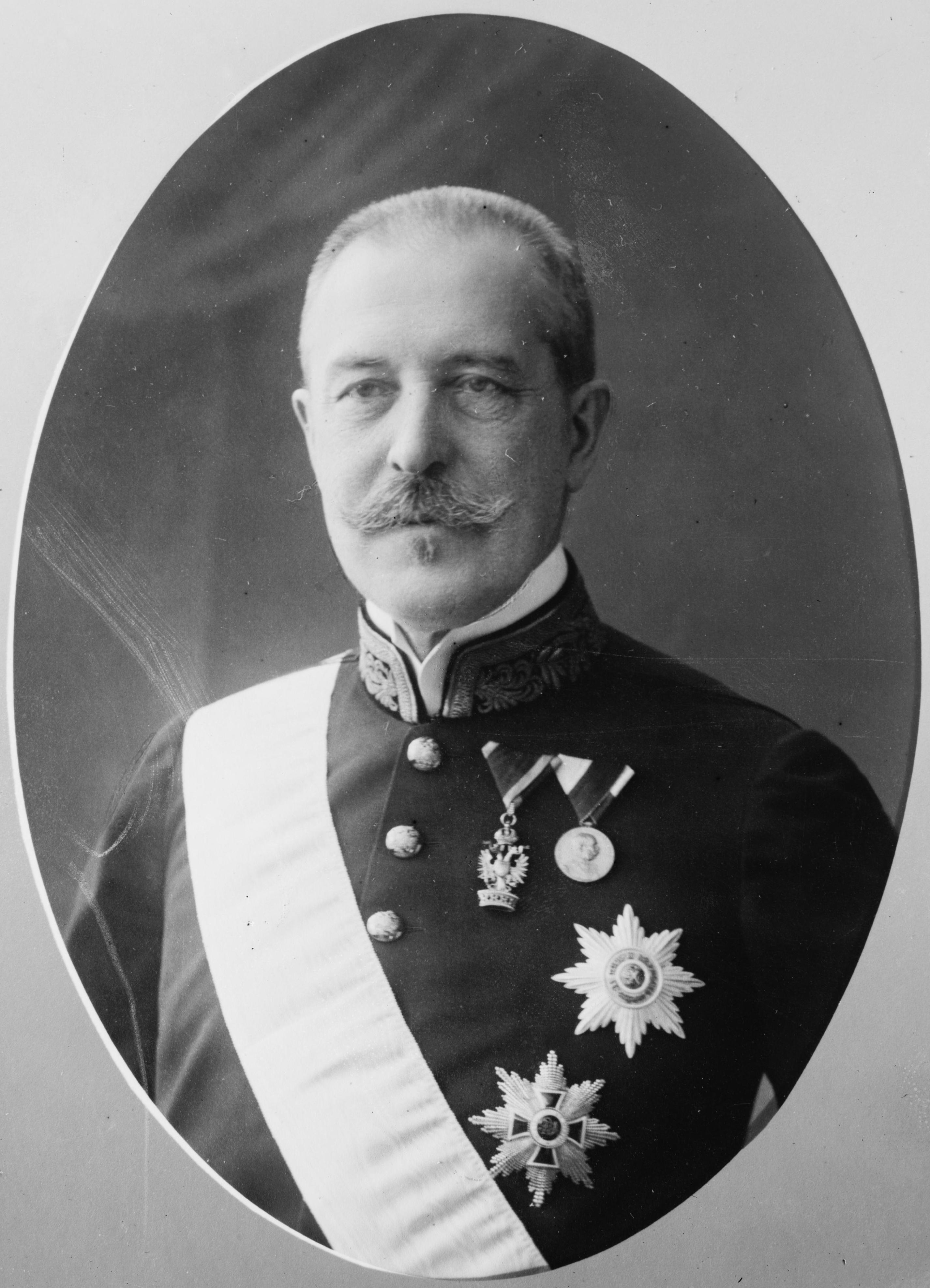 Alois Graf Lexa von Aehrenthal. Fotografie des Atelier Adele, 1907.[1]